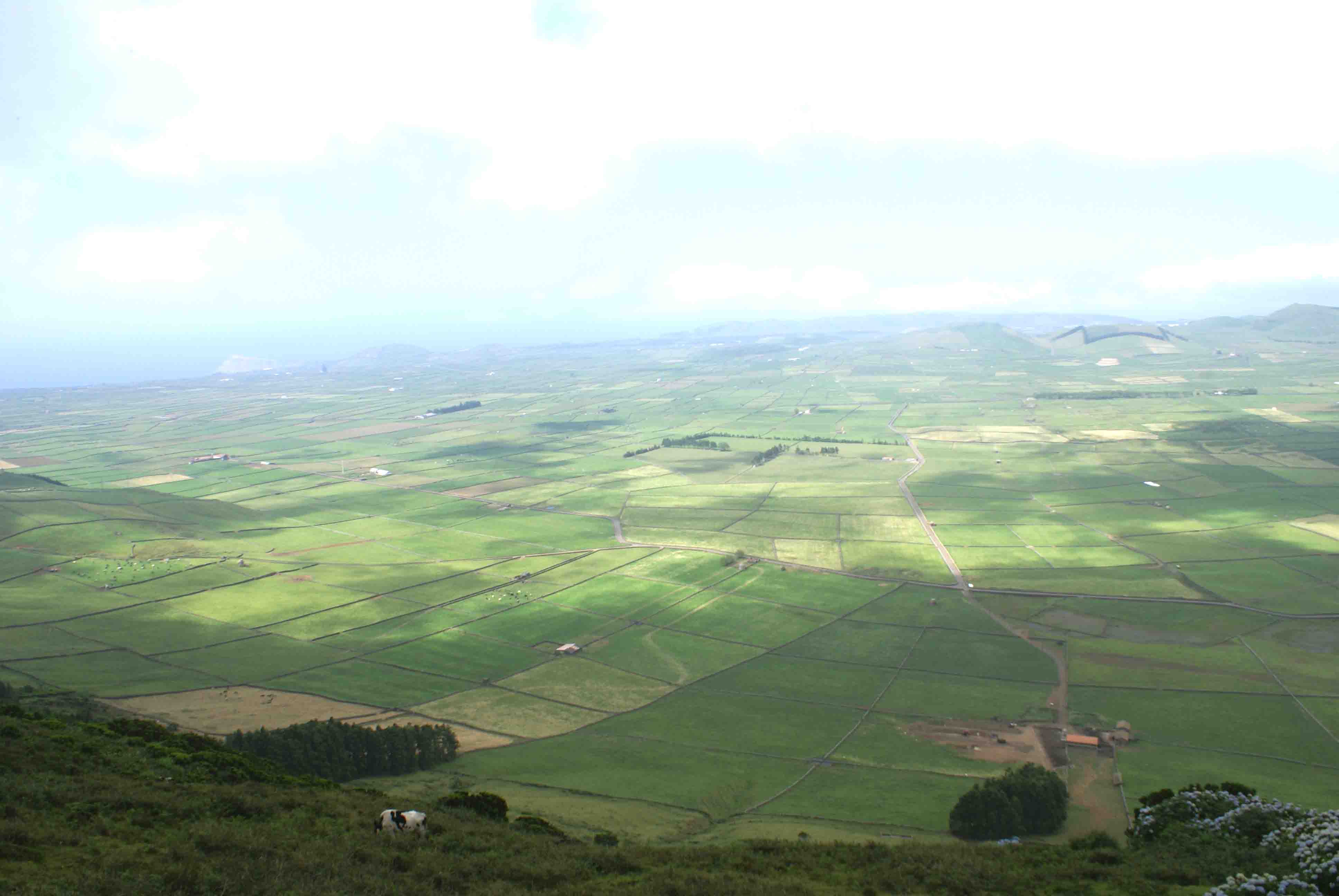 Miradouro da Serra do Cume, planície da caldeira primordial, Praia da Vitória, ilha Terceira, Açores, Portugal.